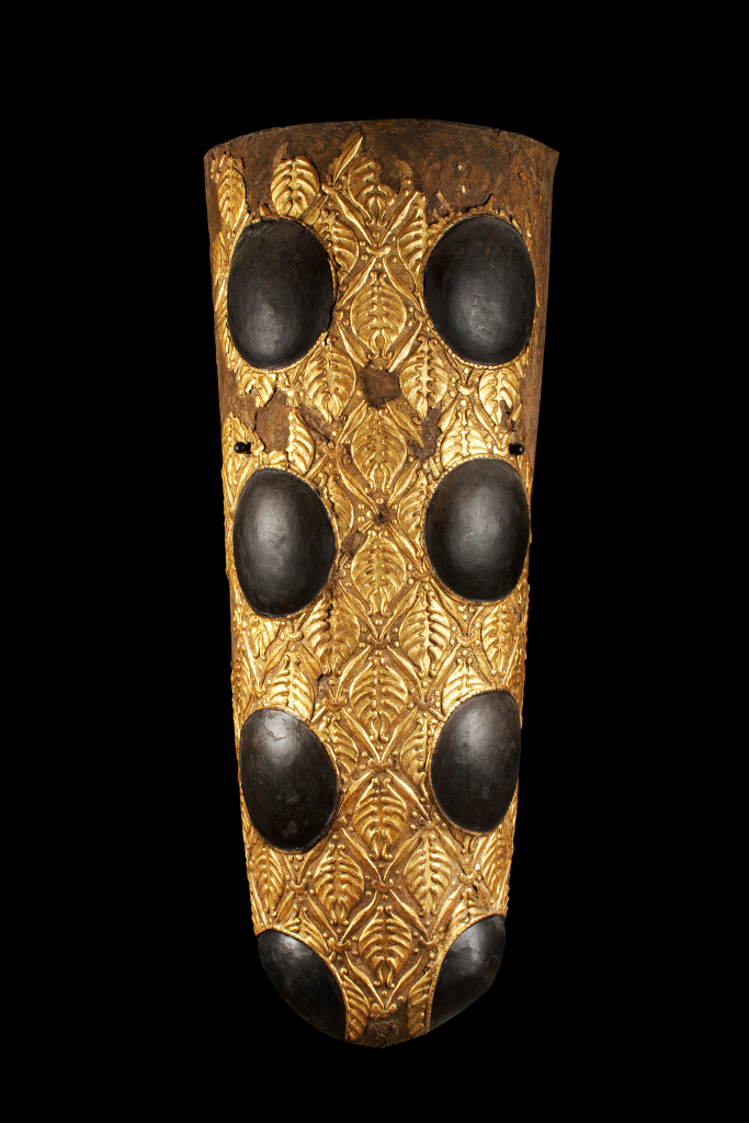 Pavès del llinatge Tarrè, del segle XIV. MiTPi. Santa Maria del Pi